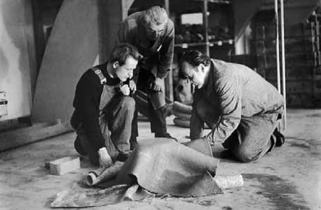 Guhl en 1951, en compagnie de Robert Haussmann (à gauche) et du mouleur Noser chez Eternit SA à Niederurnen